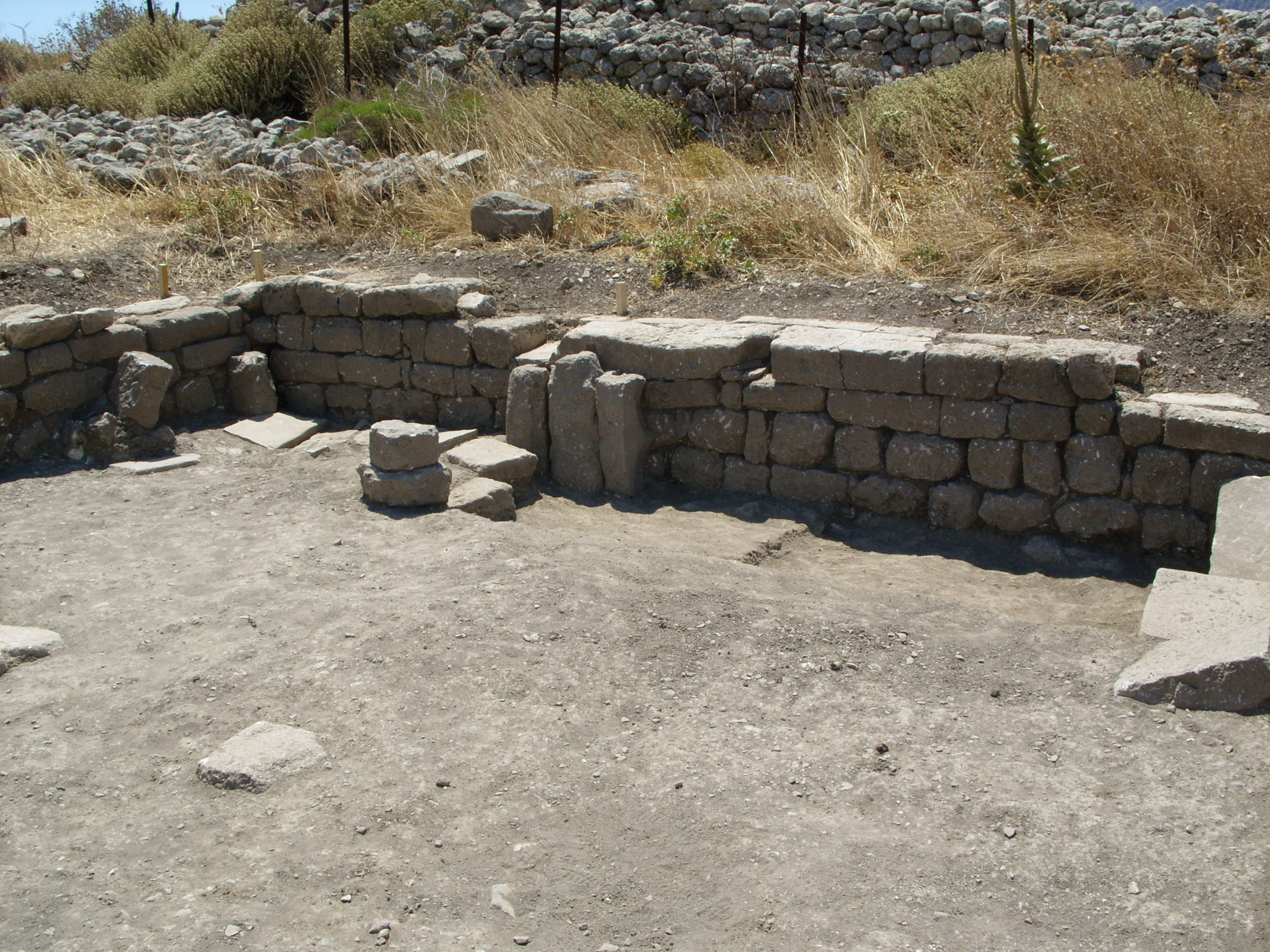 Scavi al santuario meridionale sulla Patela di Prinias